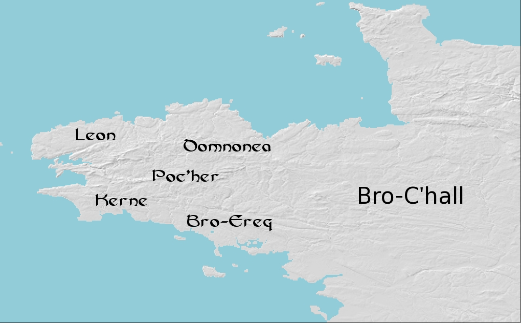 Rouantelezhioù kozh Breizh